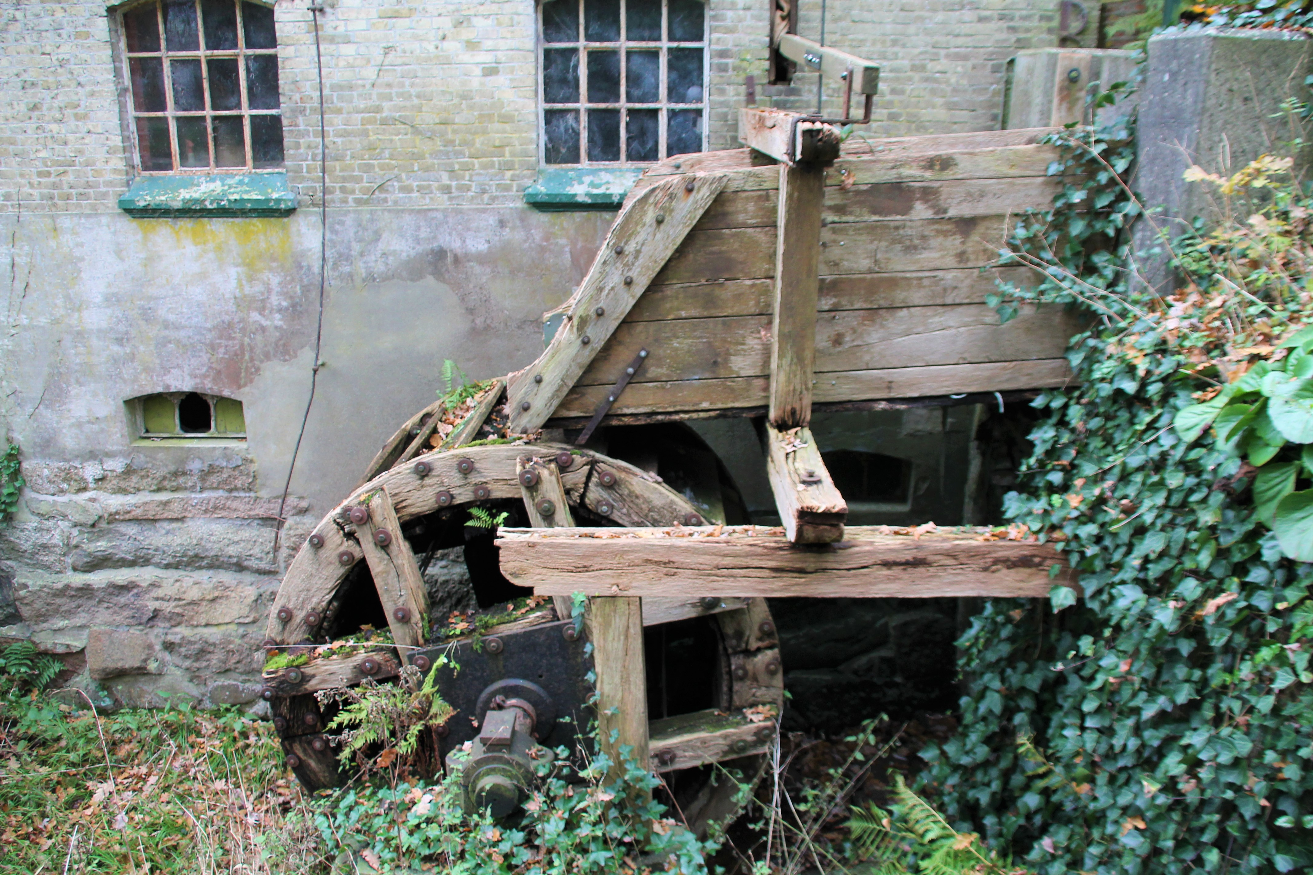 Die alte Wassermühle in Albersdorf am Rande des Mühlenteichs